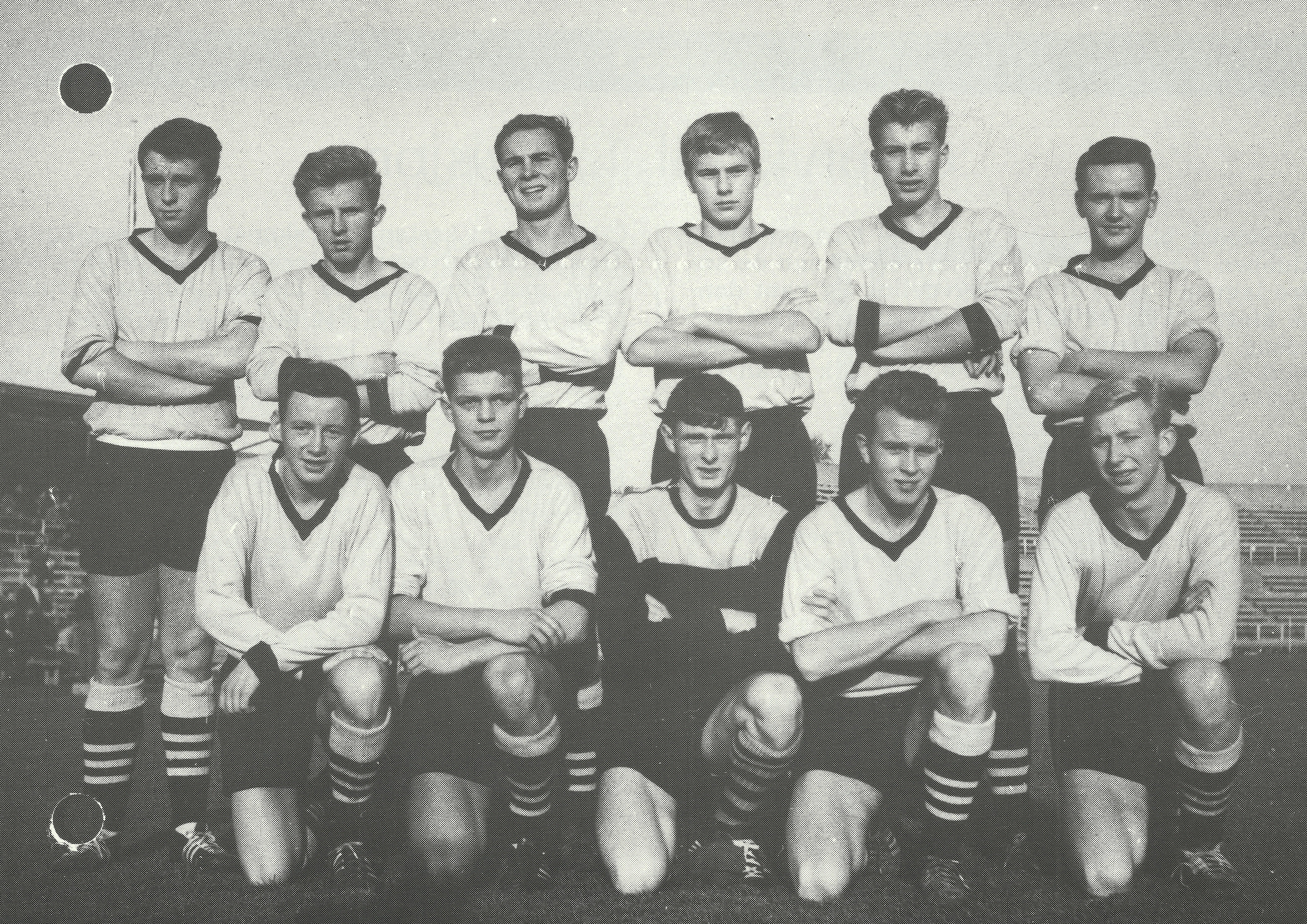 Ballklubbens norgesmestre for juniorer 1961. Foran fra venstre: Ivar Otto Myhre, Arne Havnås, Arne Larsen, Harald Aase og Willy Andersen. Bak fra venstre: Jan Borgersen, Steinar Sandnes, Jan A.Andersen, Kåre Bjørvik, Bjørn Gunnar Johannessen og Gunnar Gunnar Prytz. Karl Johan Larsen spilte også kampen.